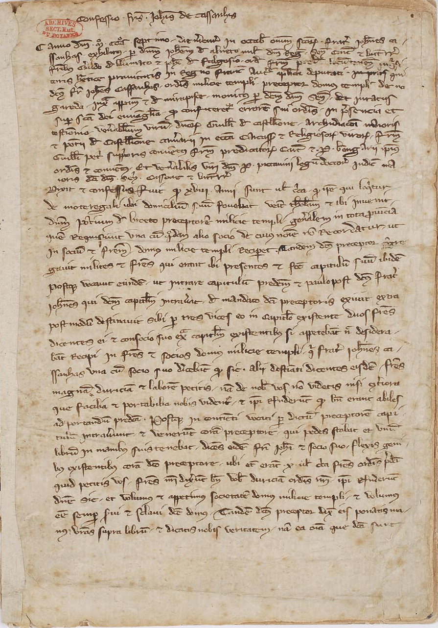 Procès verbal d'interrogatoire des Templiers de la sénéchaussée de Carcassonne, 13 novembre 1307 (première page)